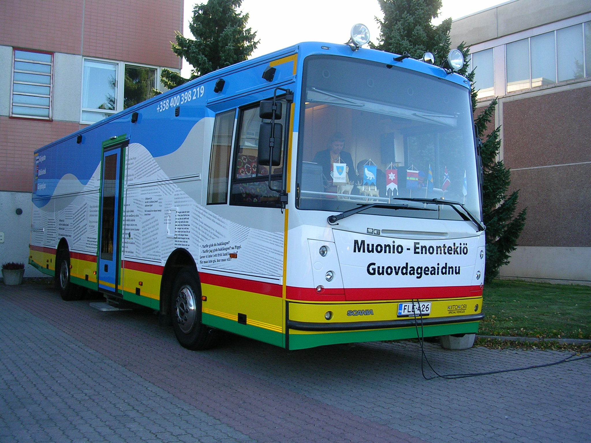 Yhteispohjoismainen kirjastoauto vuonna 2015. Davvisámegiella: Oktasaš davviriikkalaš girjebusse 2015.